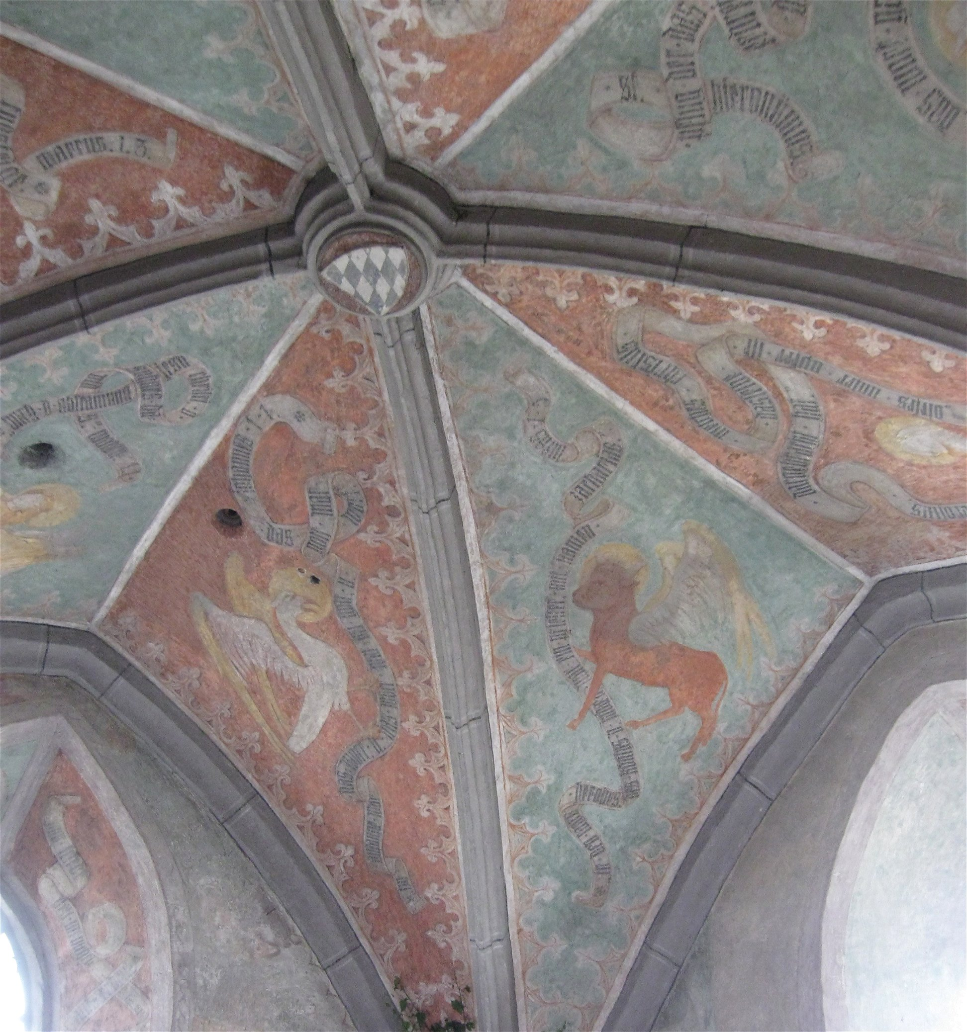 Altkirchen, Oberbiberger Straße 10; Kath. Kuratiekirche St. Margaretha, Langhaus im Kern 11./13. Jh., nach Westen erweitert 1965, Chorturm 15. Jh., Barockisierung der Anlage 1680; mit Ausstattung; Friedhof mit Ummauerung. Innenraum